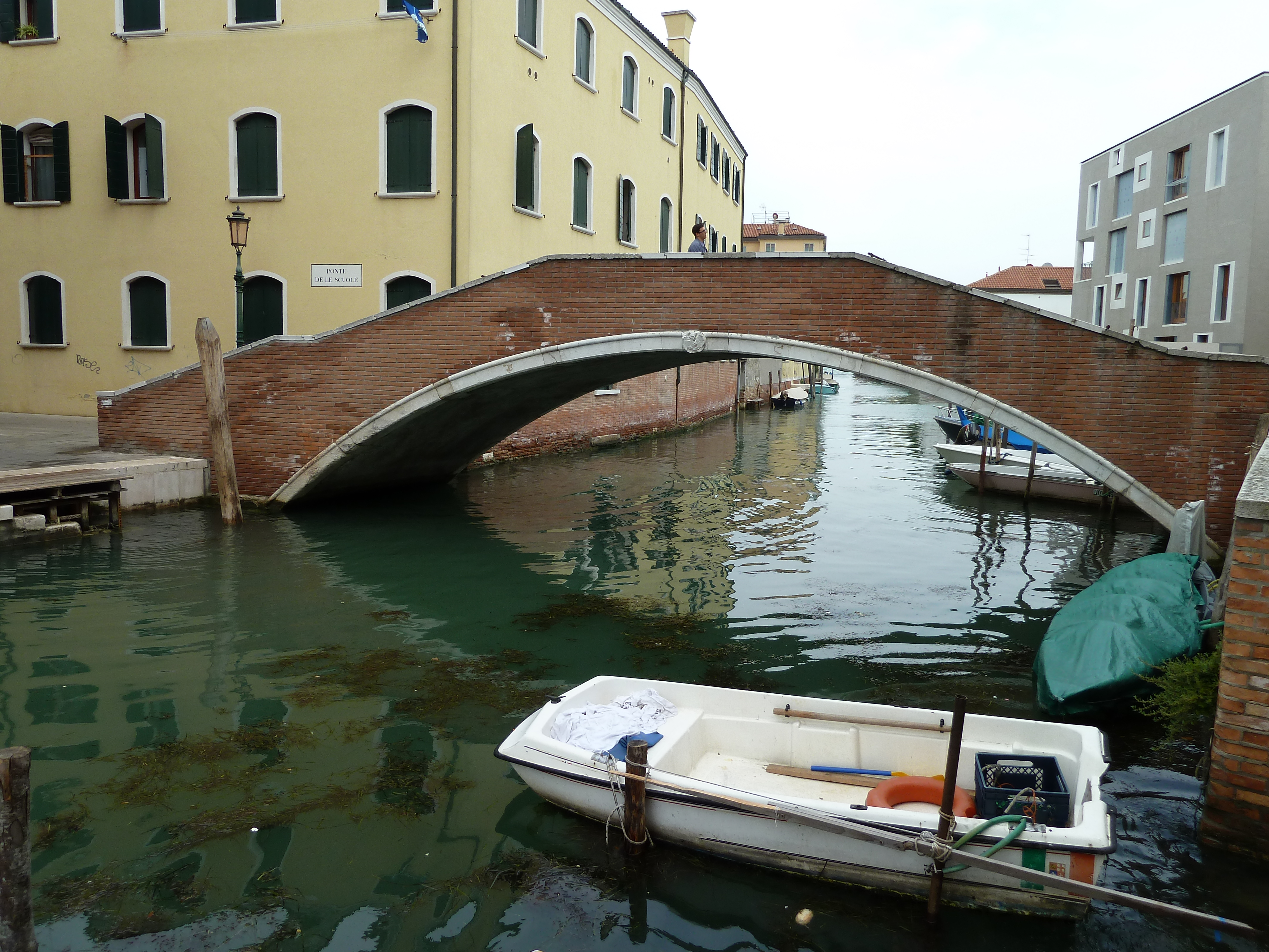 Ponte de le Scuole (Venice)